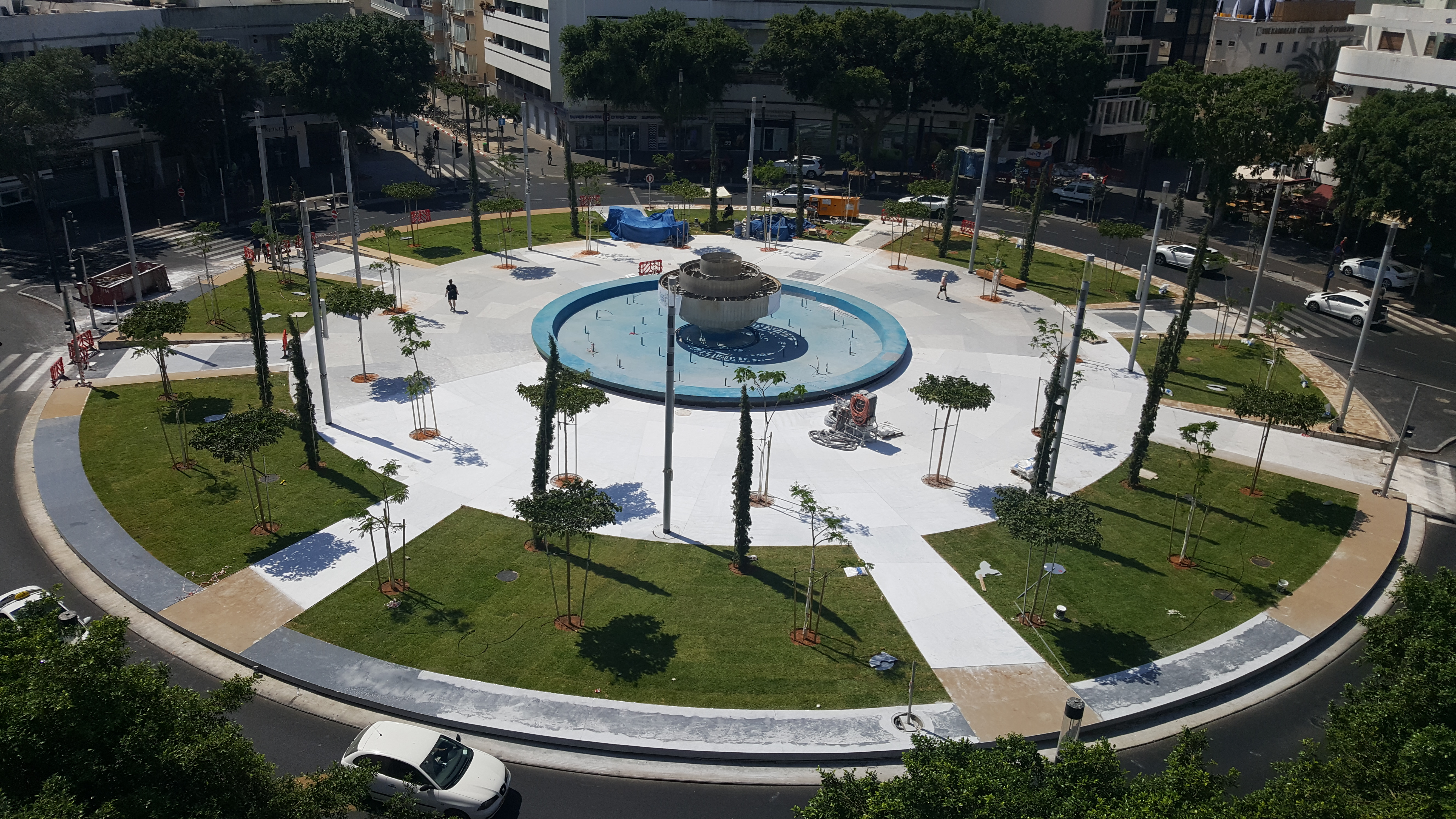 כיכר צינה דיזנגוף קרויה על שם צינה דיזנגוף, רעייתו של ראש העיר הראשון, מאיר דיזנגוף. הכיכר נחשבה במשך שנים רבות כאחד מסמליה של תל אביב. הכיכר הייתה חלק מתוכנית גדס, תוכנית מתאר לעיר תל אביב שהכין פטריק גדס, מתכנן ערים סקוטי. עיצוב הכיכר נעשה על ידי האדריכלית ג'ניה אוורבוך, שזכתה בתחרות העיצוב של הכיכר בשנת 1934. התכנון היה על פי קריטריונים של הסגנון הבינלאומי, שהיה הסגנון האדריכלי המרכזי בתל אביב בתקופה זו.